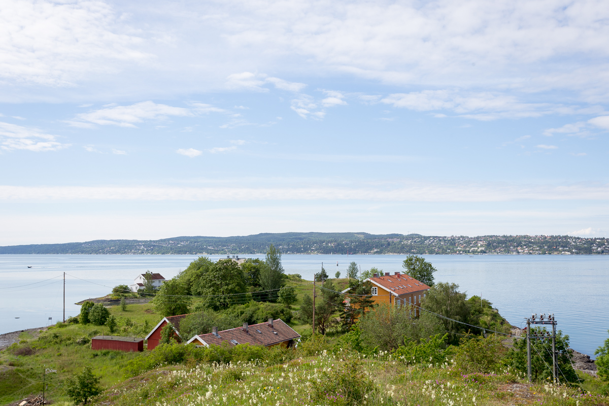 Heggholmen var tidligere en separat øy i indre Oslofjord men er nå forbundet med Gressholmen og Rambergøya med steinfylling.